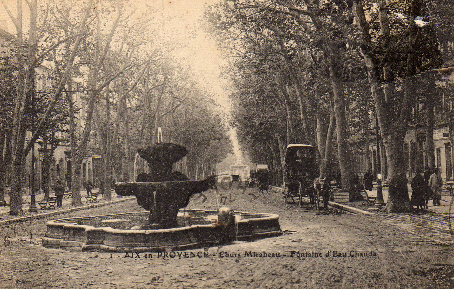 Fontaine des Neuf-Canons, cours Mirabeau, Aix-en-Provence, 1914. En 1914, la fontaine est encore visible dans son intégrité, avant qu'elle ne soit amputée des deux lobes gênant la circulation automobile. Par ailleurs, le titre de la carte postale comporte une erreur fréquente, confondant la fontaine des Neuf-Canons avec la fontaine d'eau chaude, dite fontaine moussue, également sur le cours Mirabeau.